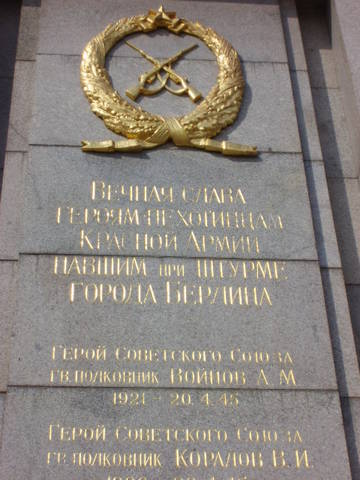 Мемориал павшим советским воинам в Тиргартене (фрагмент). Надпись на пилоне.